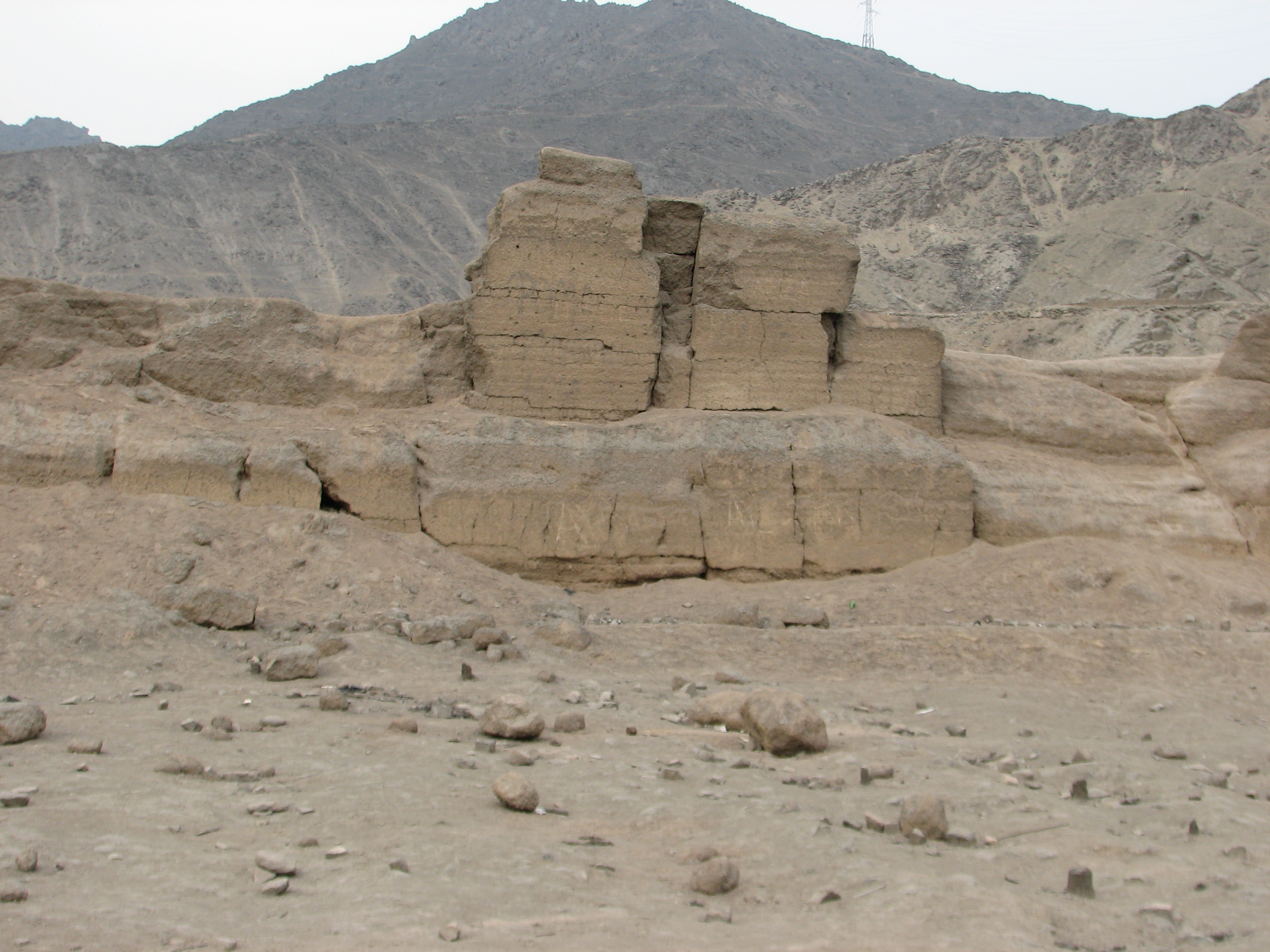 Mangomarca Archaeological site (wall)